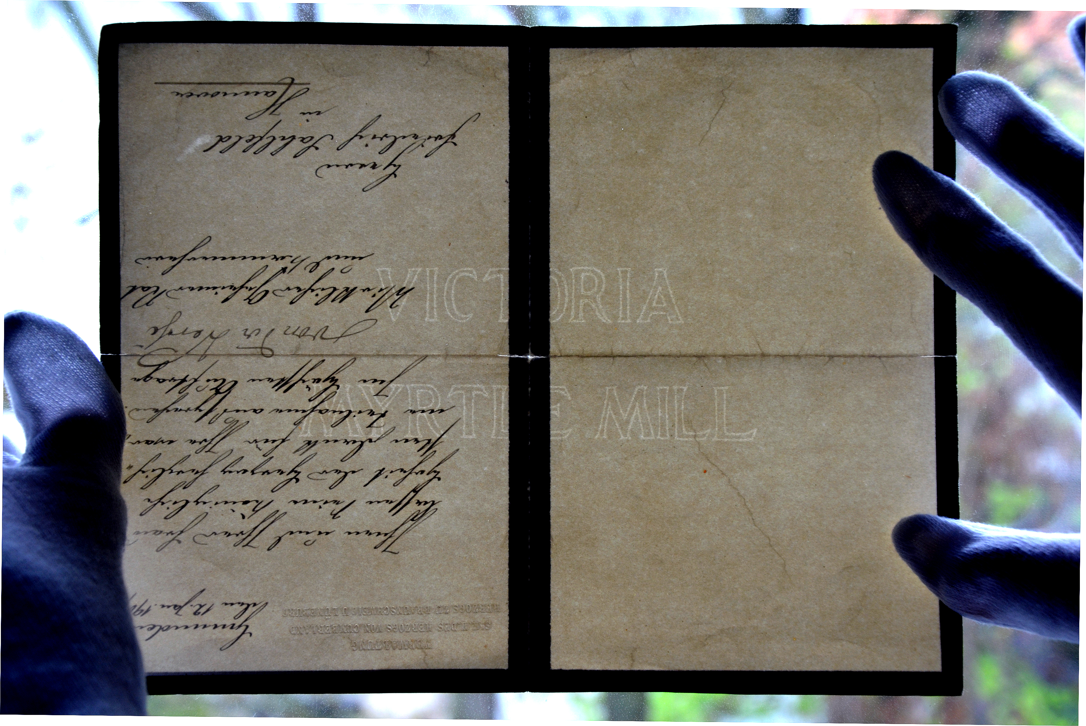 Wasserzeichen VICTORIA MYRTEL MILL auf dem hier entfalteten Briefbogen, den Georg Karl Gebhard Freiherr von der Wense im Auftrag Ernst August von Hannover (1845–1923) anlässlich des Todes der nach Österreich exilierten Marie, Königin von Hannover, an den ehemaligen Königlich Hannoverschen Feldapotheker Sahlfeld in Hannover sandte. Das konfektionierte Briefpapier war von der Firma Myrtle Mill geliefert worden ...